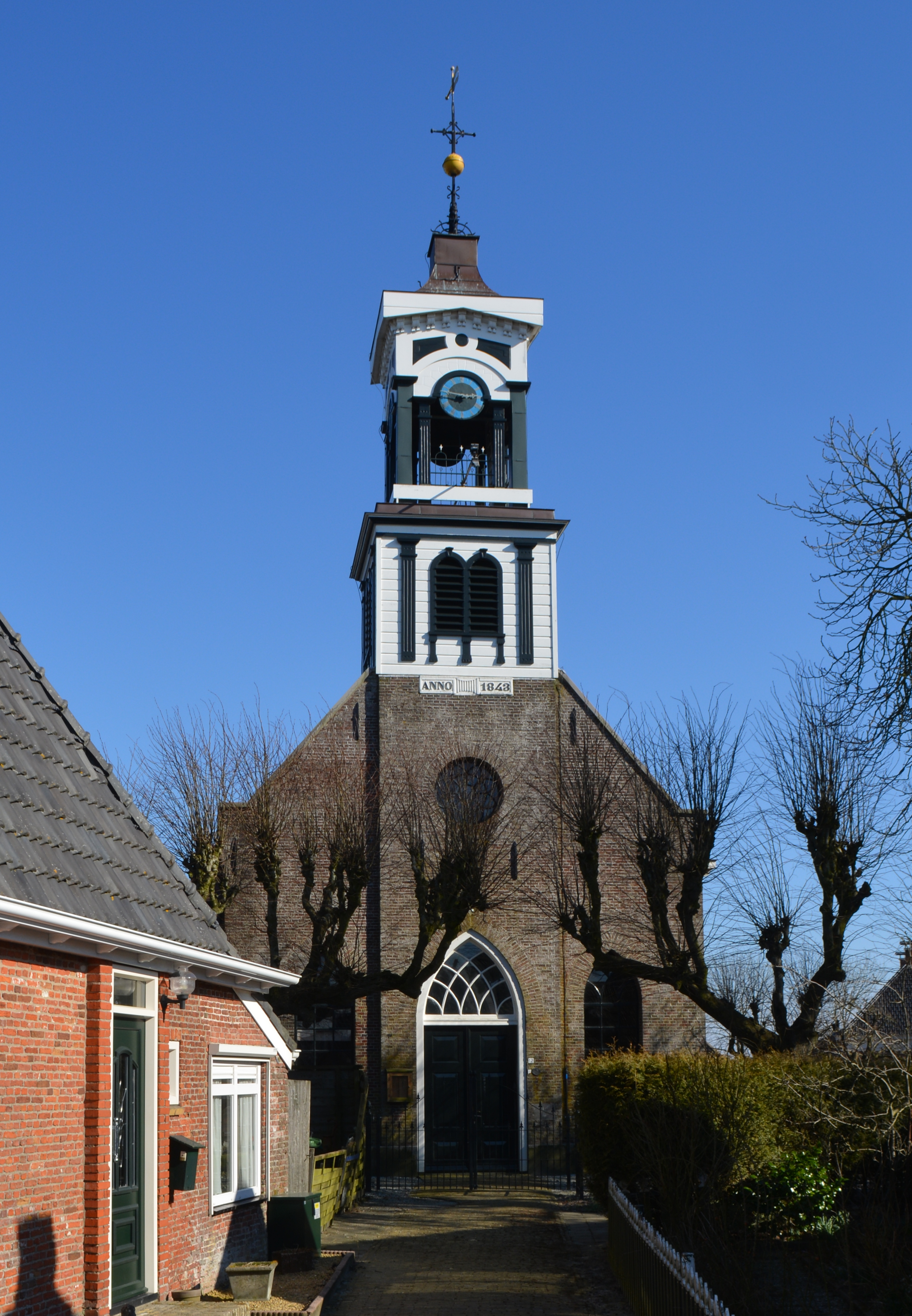 Tsjerke fan Moarre